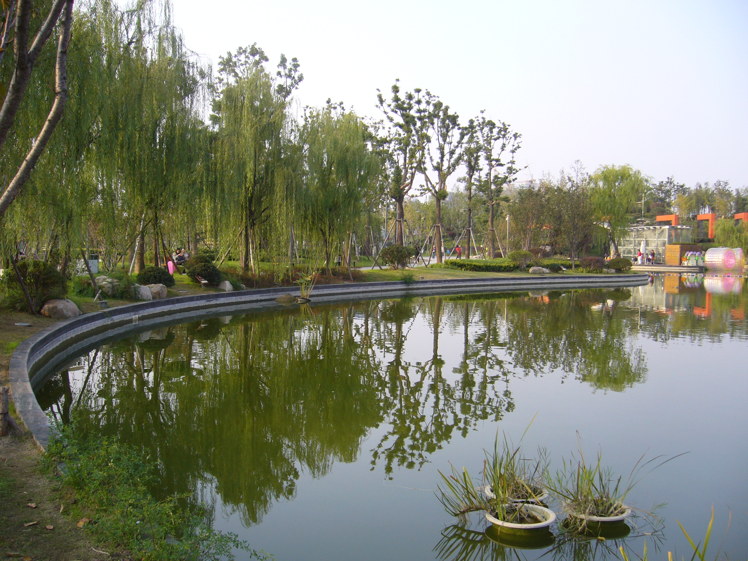 中央公园美丽景色.